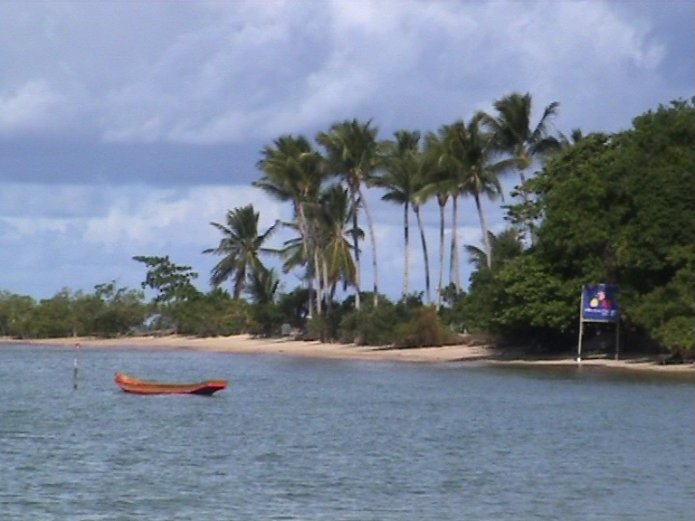 Morro de São Paulo.